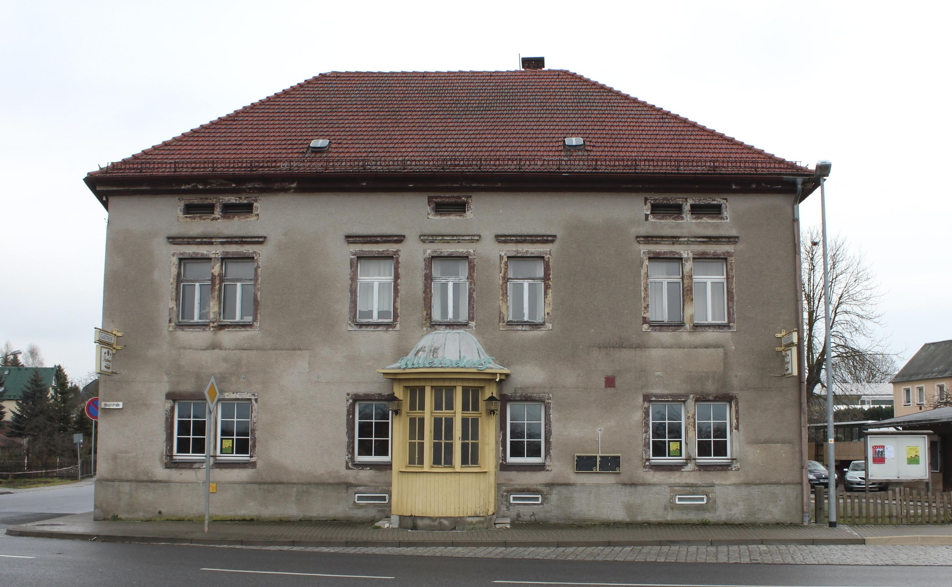 leerstehender Gasthof in Ullersdorf bei Dresden